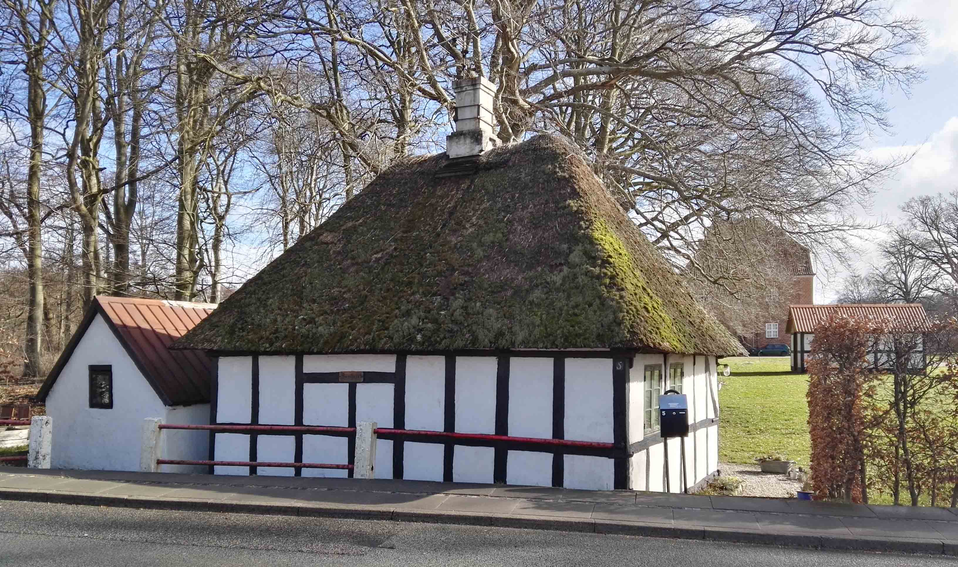 Bomhuset ved Gammel Ryomgård - i baggrunden ses herregården